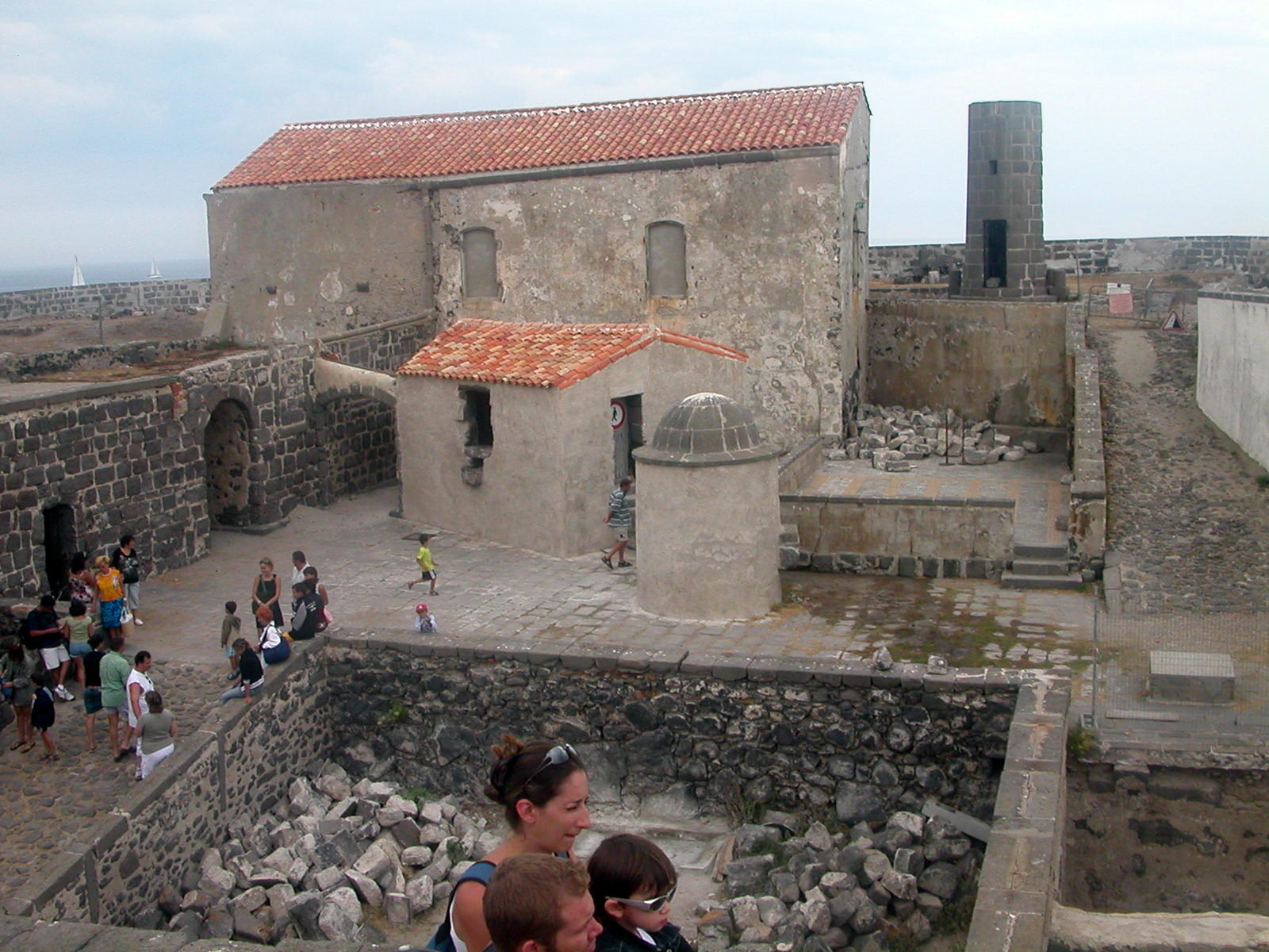 Le Fort de Brescou (Agde - Hérault)